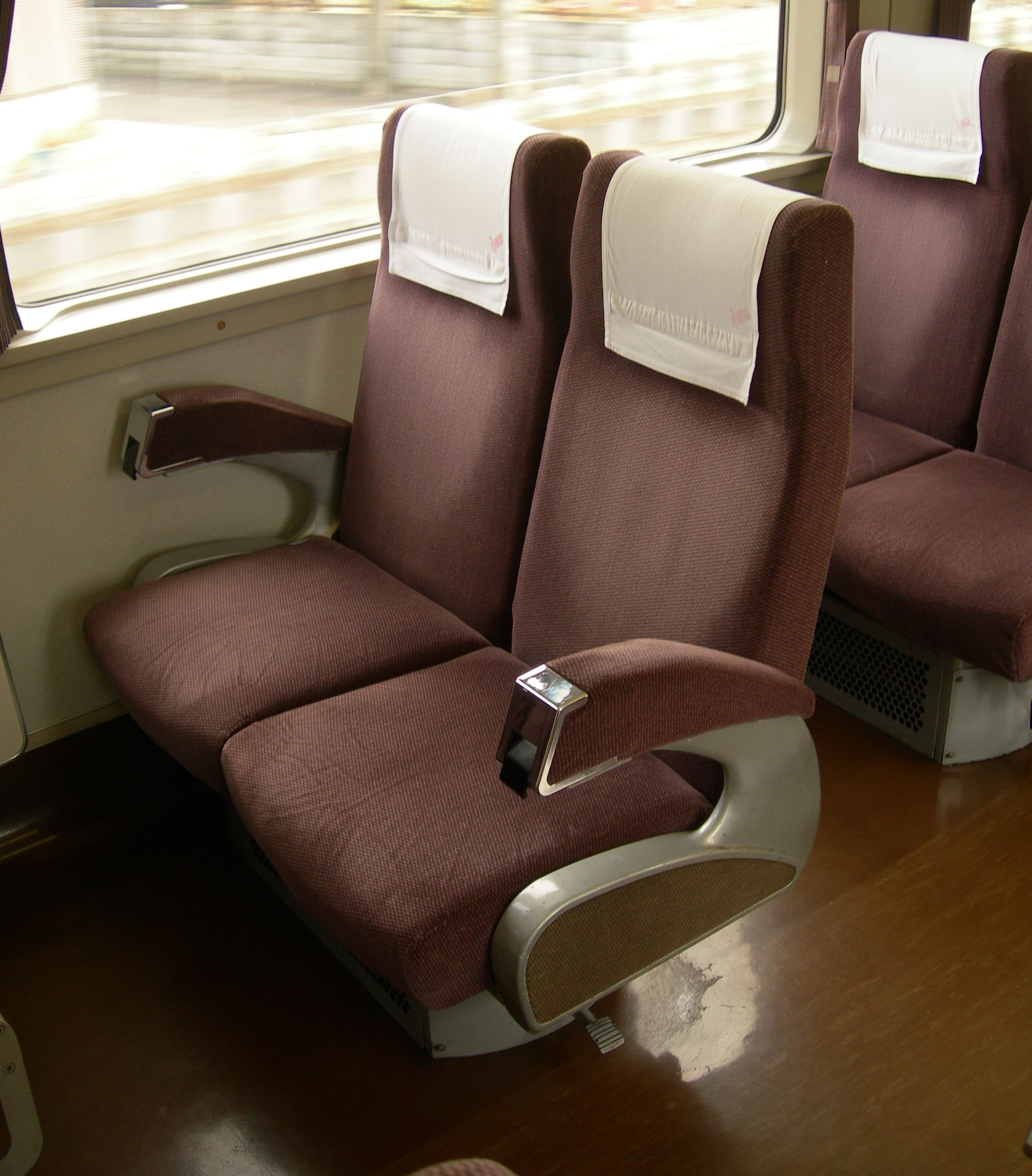 東武200系電車206F編成の座席